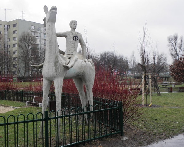 autor: Władysław Trojan - polski artysta, rzeźbiarz